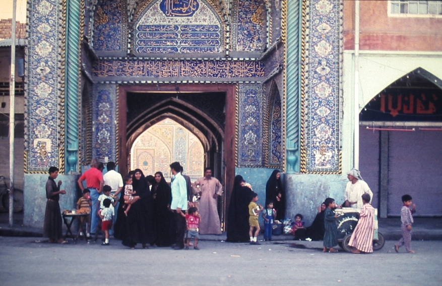 Bildbeschreibung: Kerbela moschee 02 Quelle: von eigenem Dia abfotografiert Fotograf: user:HerbertReichart germany Datum der Originalaufnahme: Sommer 1975